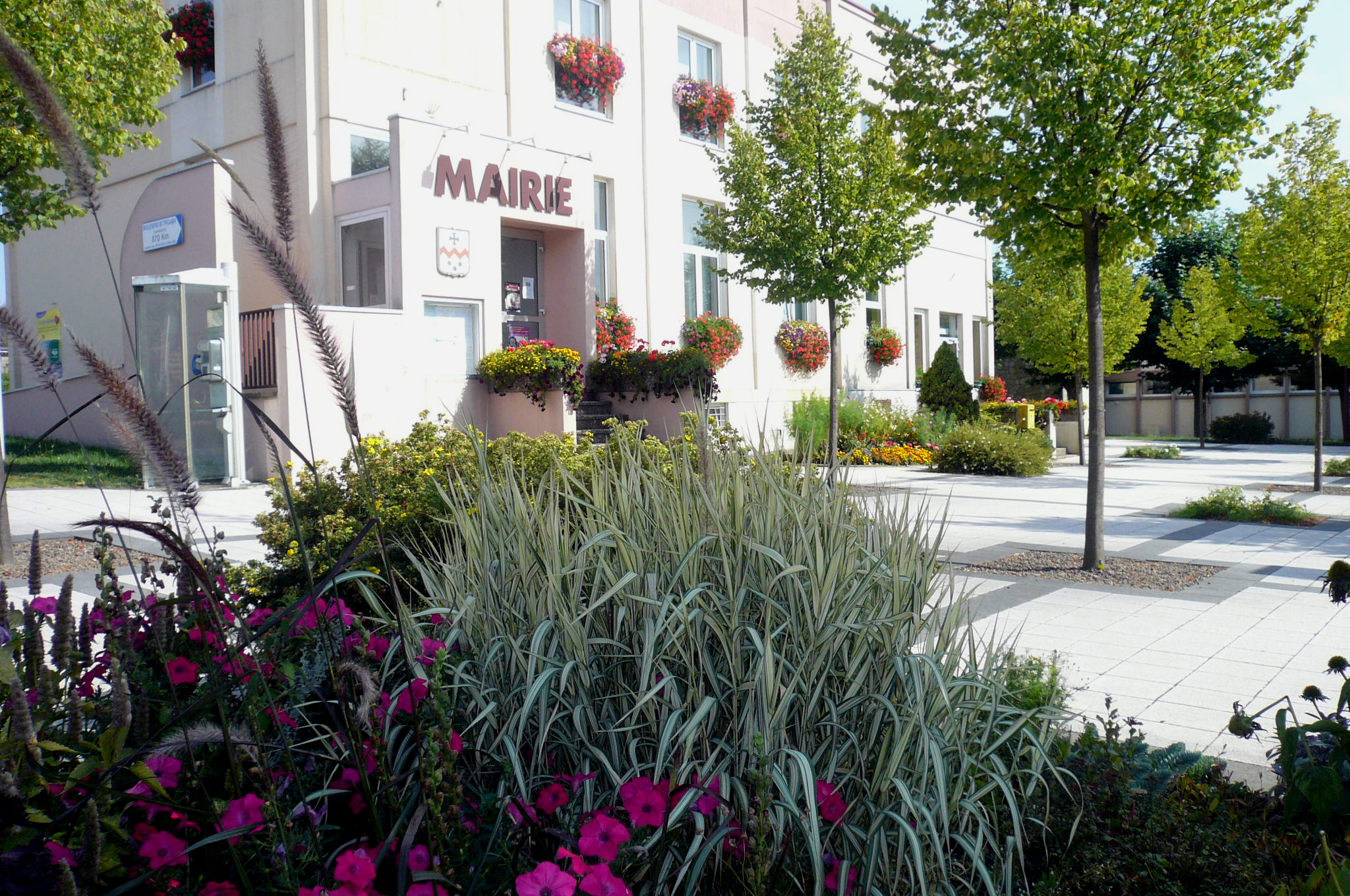 La mairie construite dans les années 60.